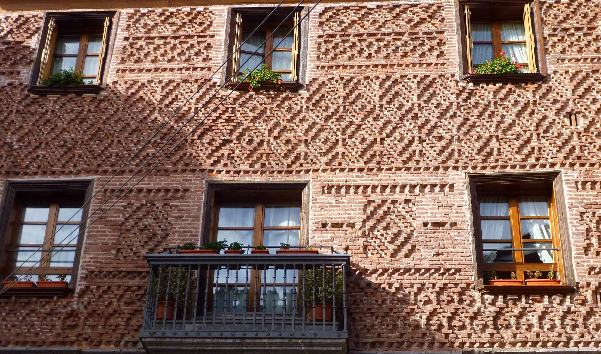 Altuna Etxea (Azpeitia)